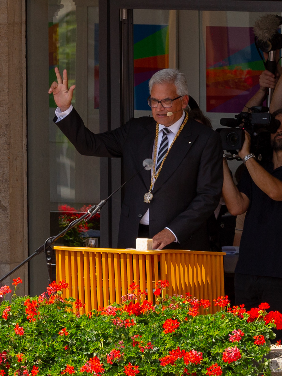 Gunter Czisch legt seinen Schwur ab bei der Schwörrede 2019